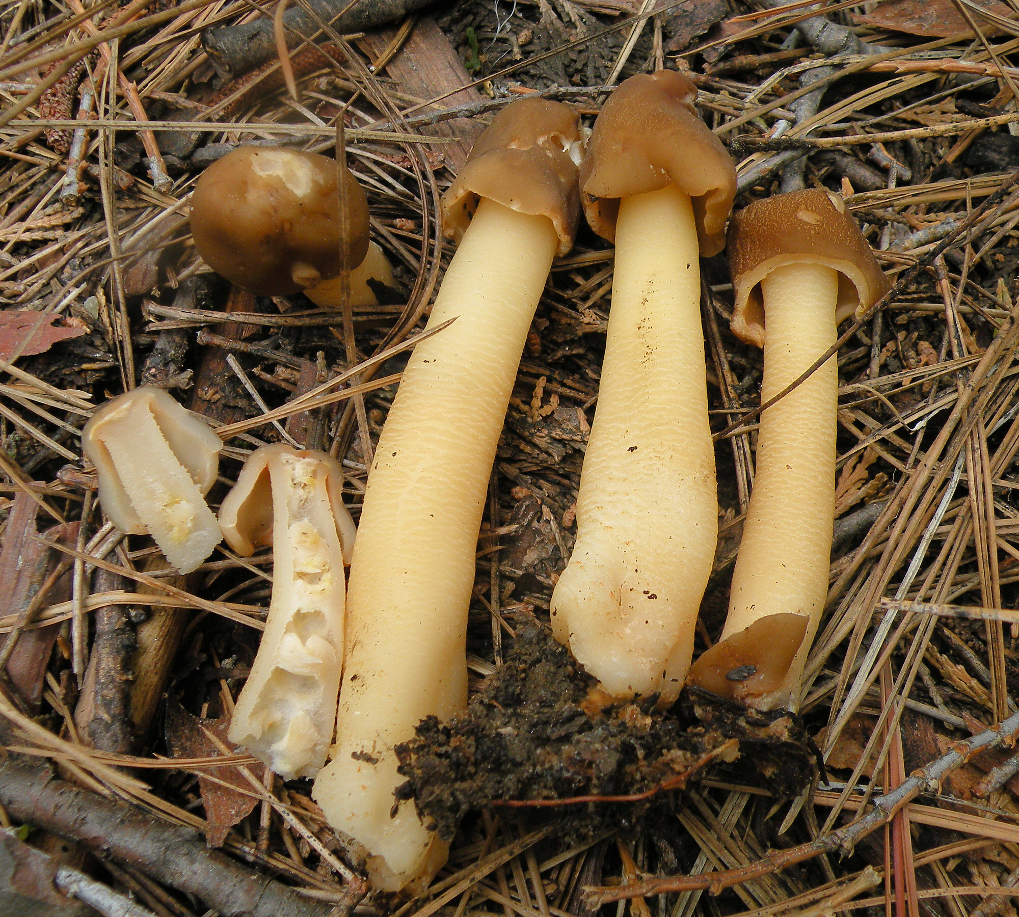 Verpa conica (O.F. Müll.) Sw., location: Beasore Rd., Sierra NF, Madera Co., California, USA